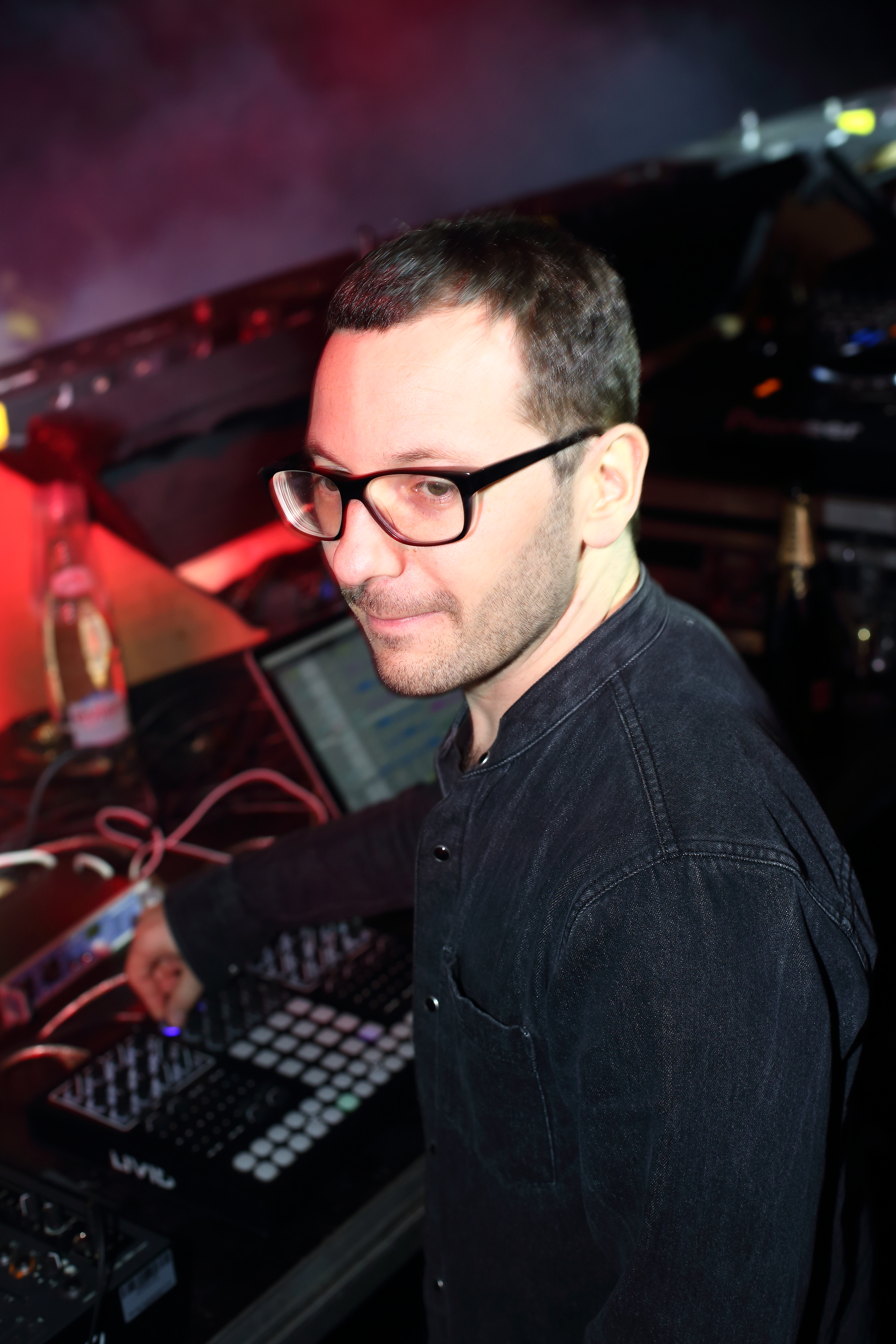 Marek Hemmann auf dem Echelon 2014 Festivalsommer This photo was created with the support of donations to Wikimedia Österreich and Wikimedia Deutschland in the context of the CPB project "Festival Summer". For taking this photo and licensing it under a free licence a (press) accreditation was required. The photographer had a valid accreditation and has sent it to the email response team, it has been archived in the OTRS system. Users with OTRS account can access it here. Please be aware that (press) accreditations are a permission to generally take photos only and do not make any statement about the copyright status of this photo! Link to the ticket: Personality rights warningAlthough this work is freely licensed or in the public domain, the person(s) shown may have rights that legally restrict certain re-uses unless those depicted consent to such uses. In these cases, a model release or other evidence of consent could protect you from infringement claims.